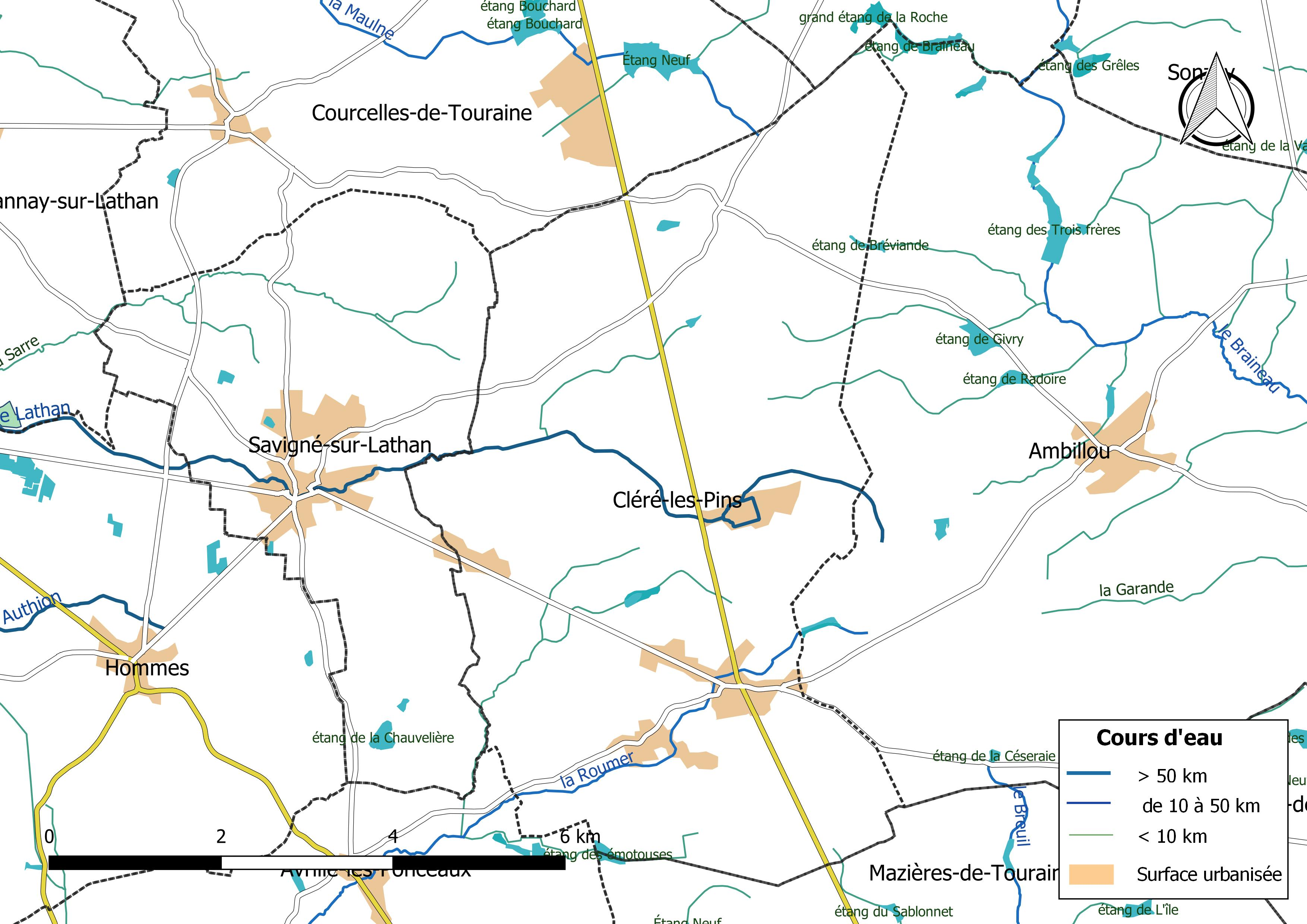 Carte du réseau hydrographique de la commune de Cléré-les-Pins (France).